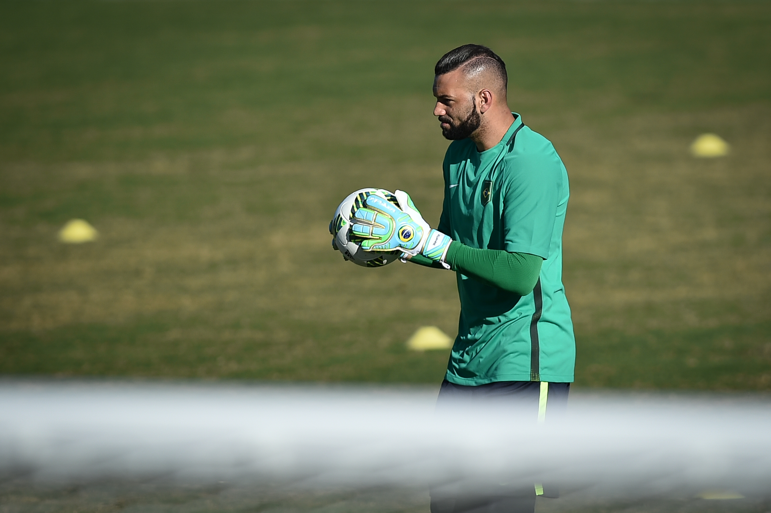 Setor de Clubes Sul, Brasília, DF, Brasil, 3/8/2016 Foto: Andre Borges/Agência Brasília. Na tarde desta quarta-feira (3), a seleção brasileira de futebol fez o último treino antes da estreia na Olímpiada. Sob o comando de Micale, os jogadores trabalharam a parte física no Centro de Treinamento do Brasiliense, no Setor de Clubes Sul.